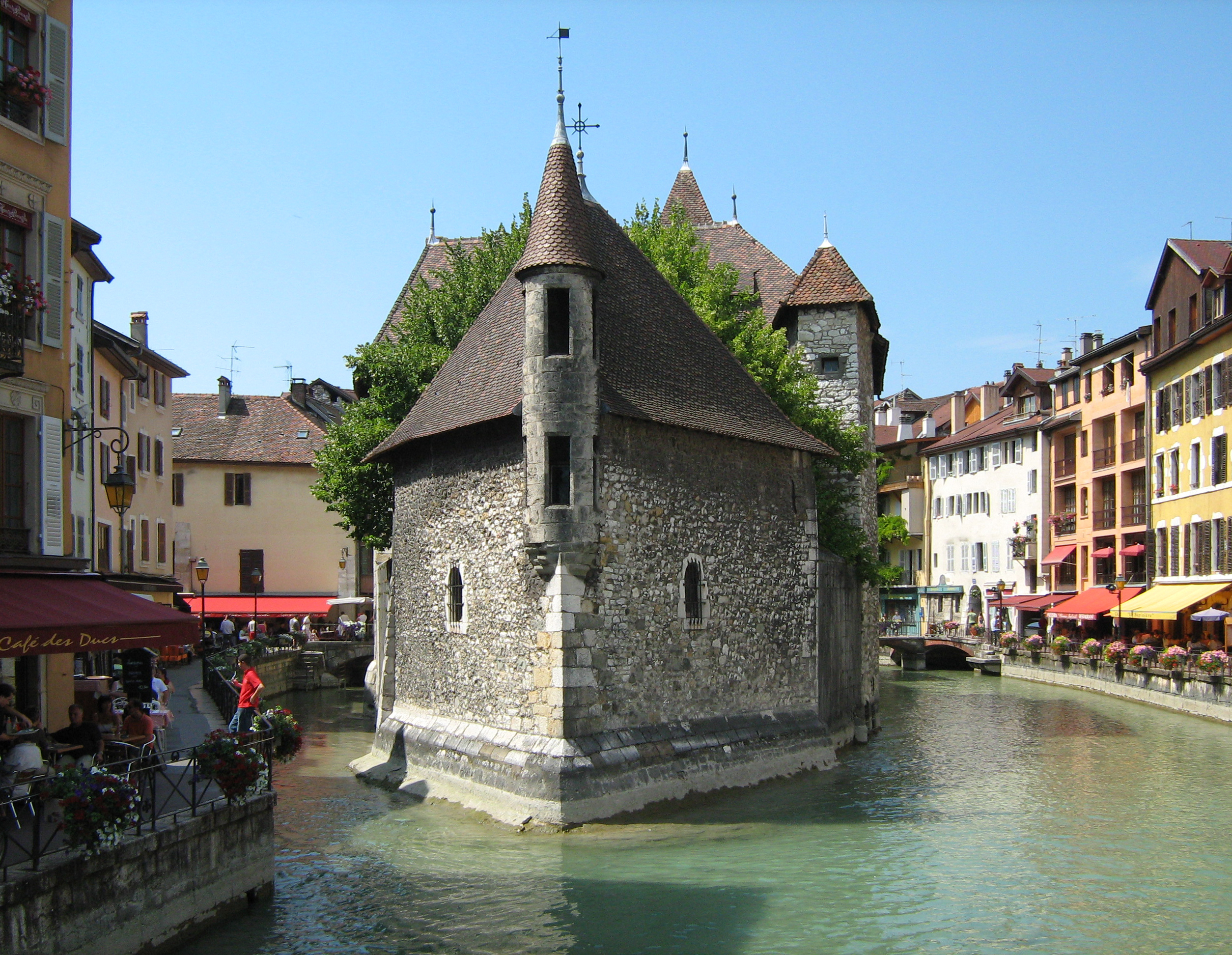 Det gamle fængsel på den lille ø i floden ved Annecy, august 2007